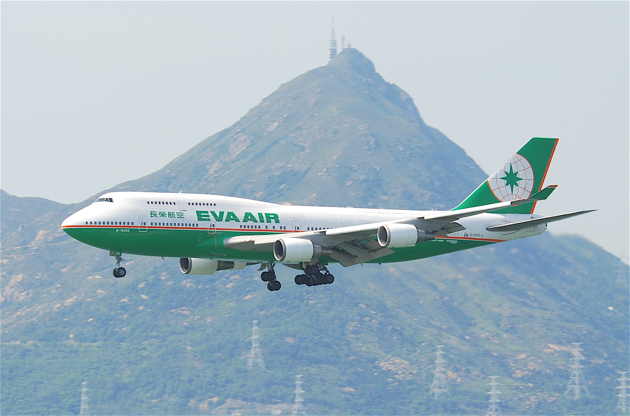 Eva Air Boeing 747-400; B-16405@HKG;04.08.2011/615wv